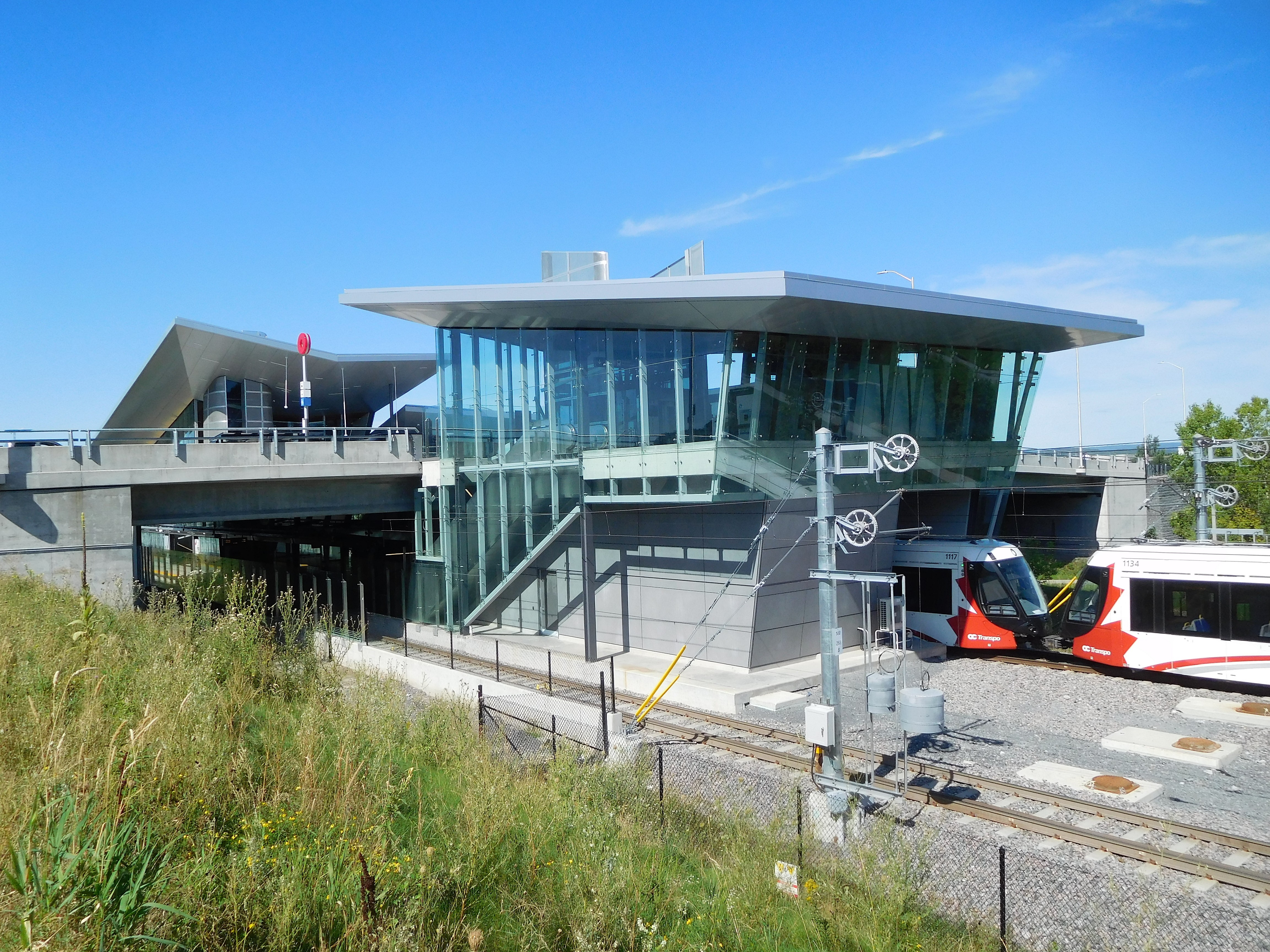 Station Pimisi de la ligne de la Confédération à Ottawa